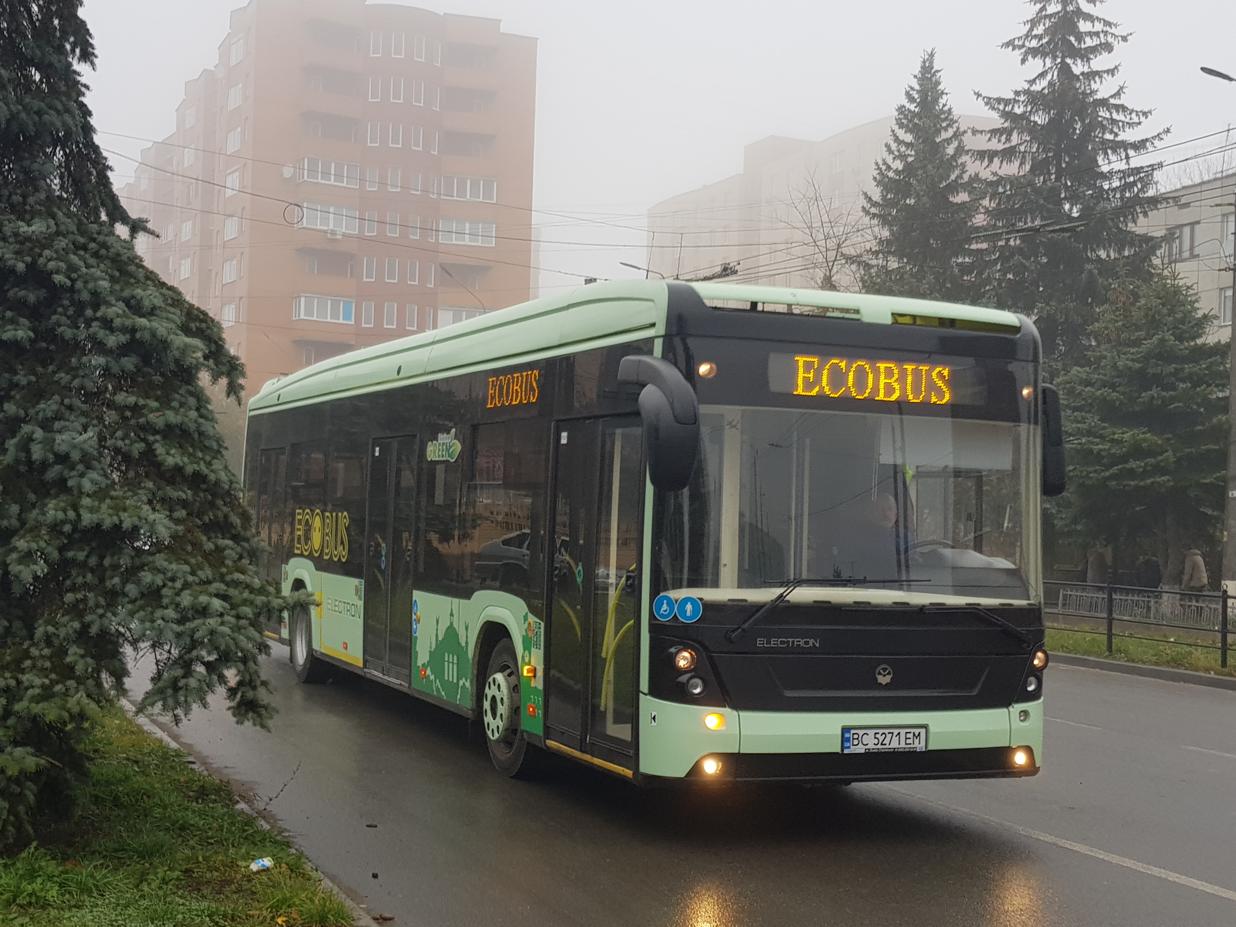 Електробус E19101 "Електрон"